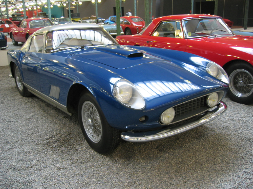 Ferrari 450 AM Coupé - 1954 - Cité de l'automobile de Mulhouse Note: This was originally (in 1954) a Ferrari 375 MM Spyder (open 2-seater), s/n 0450AM.[1] Rebodied to a Tour de France (TdF) "lookalike" berlinettta/coupe by Carrozzeria Scaglietti for emperor Bảo Đại (1913–97) from Vietnam who moved to the French riviera in the 1950s.[2][3]